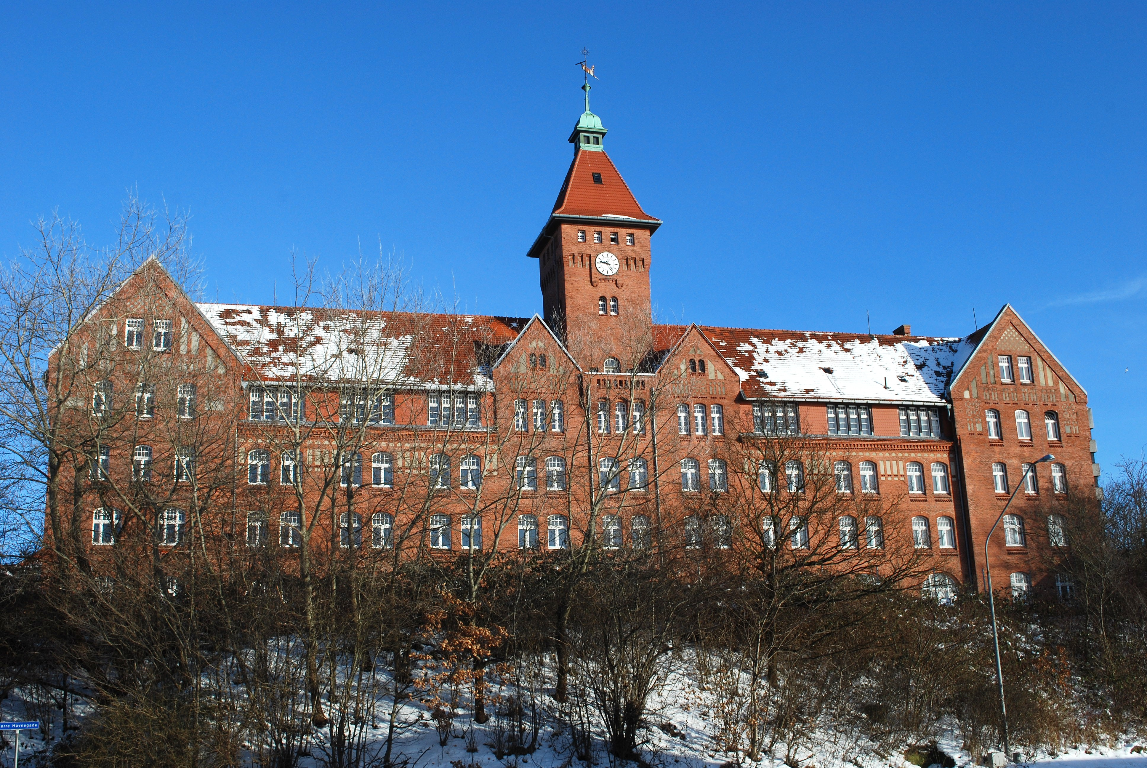 Sønderborg Kaserne, Sønderborg, Danmark